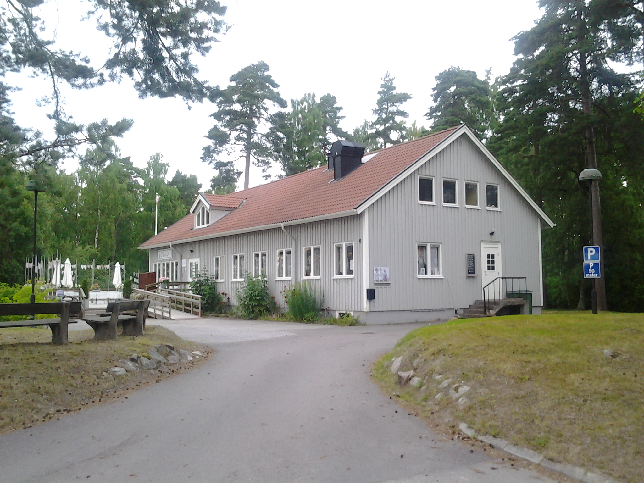 Före detta soldathemmet vid Kristinehamns garnison